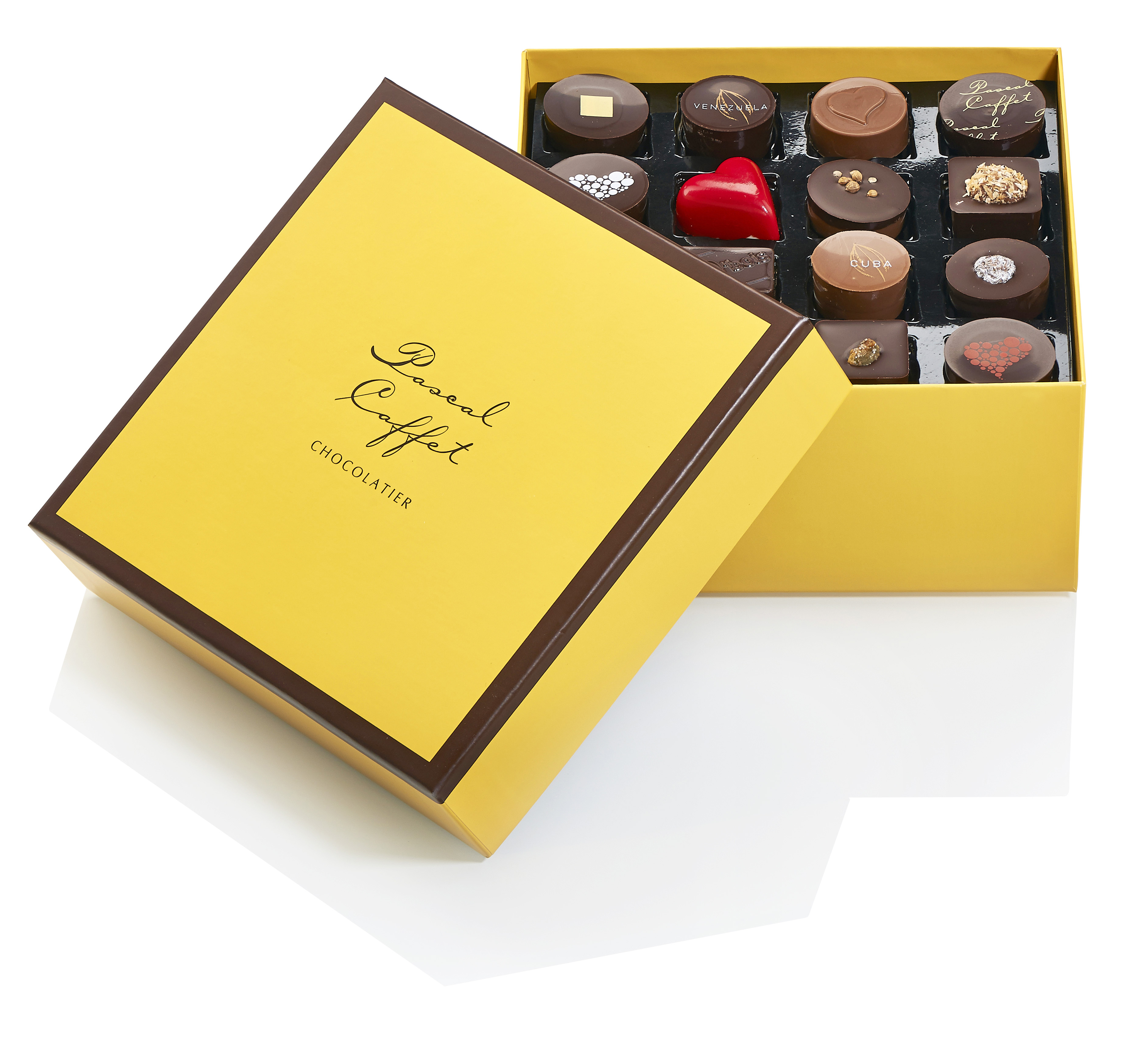 boite de chocolats